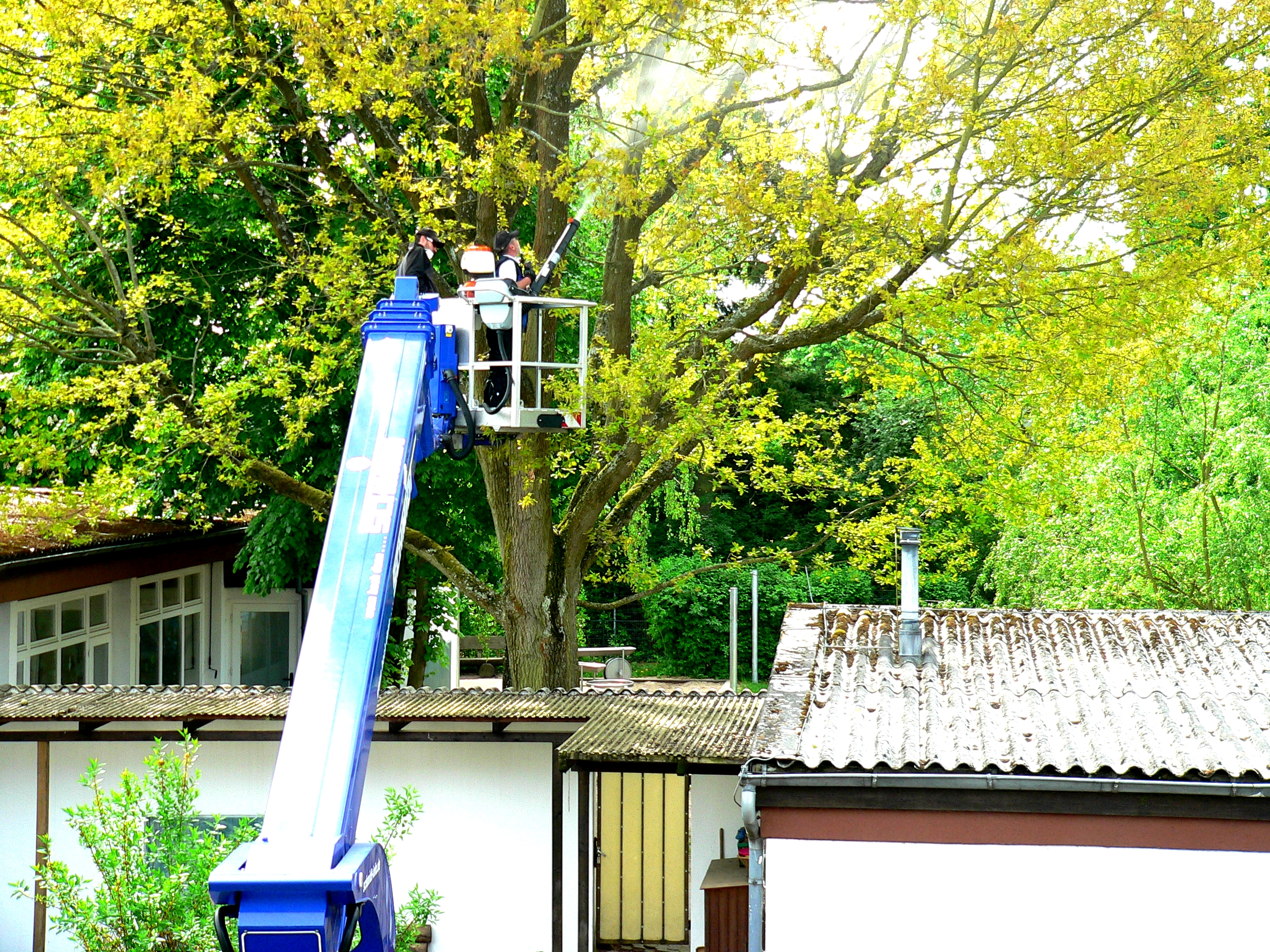 Bekämpfung von Eichen-Prozessionsspinnern durch Einsprühen mit Bacillus thuringiensis in einem Kindergarten